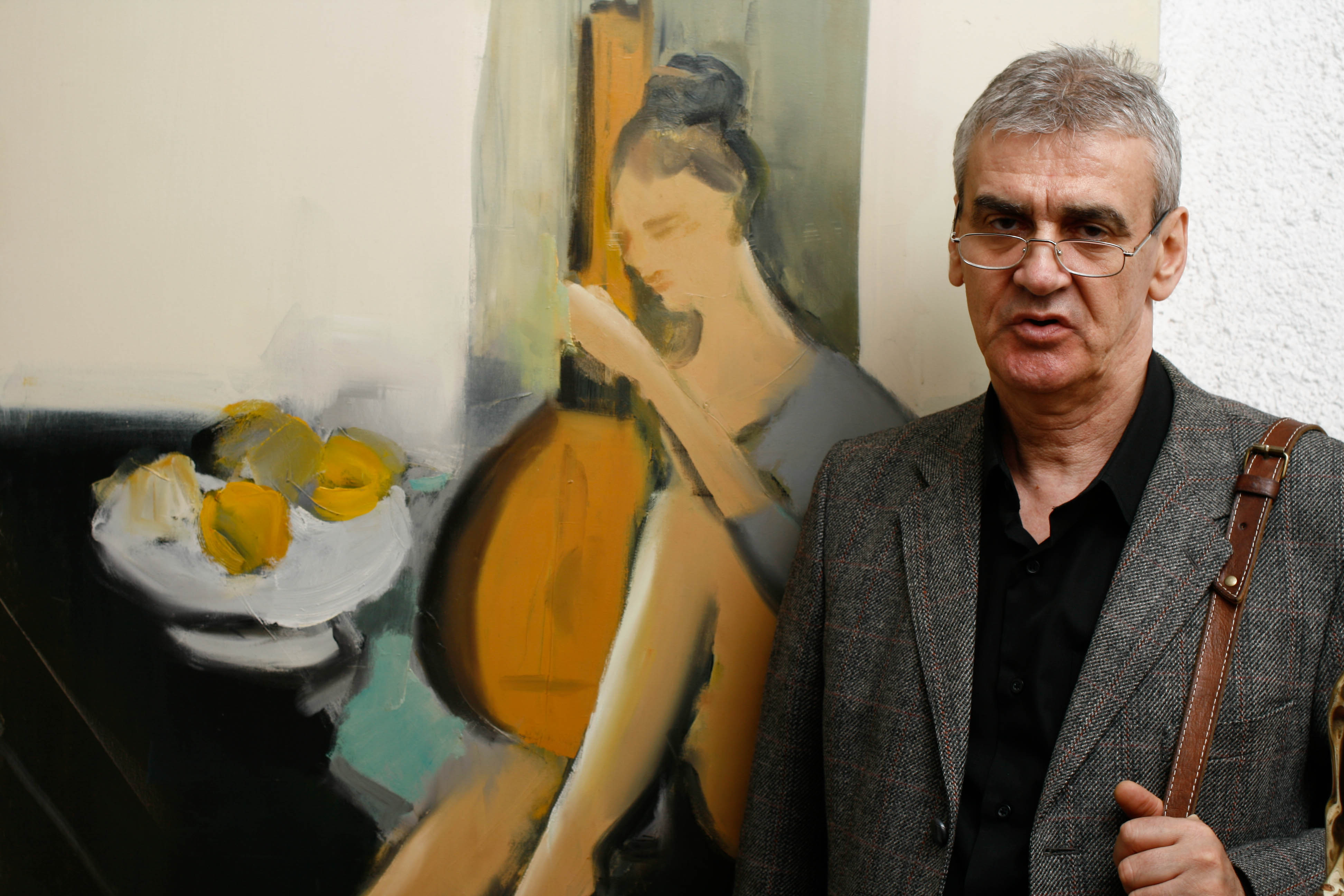 Corneliu Ionescu - Foto